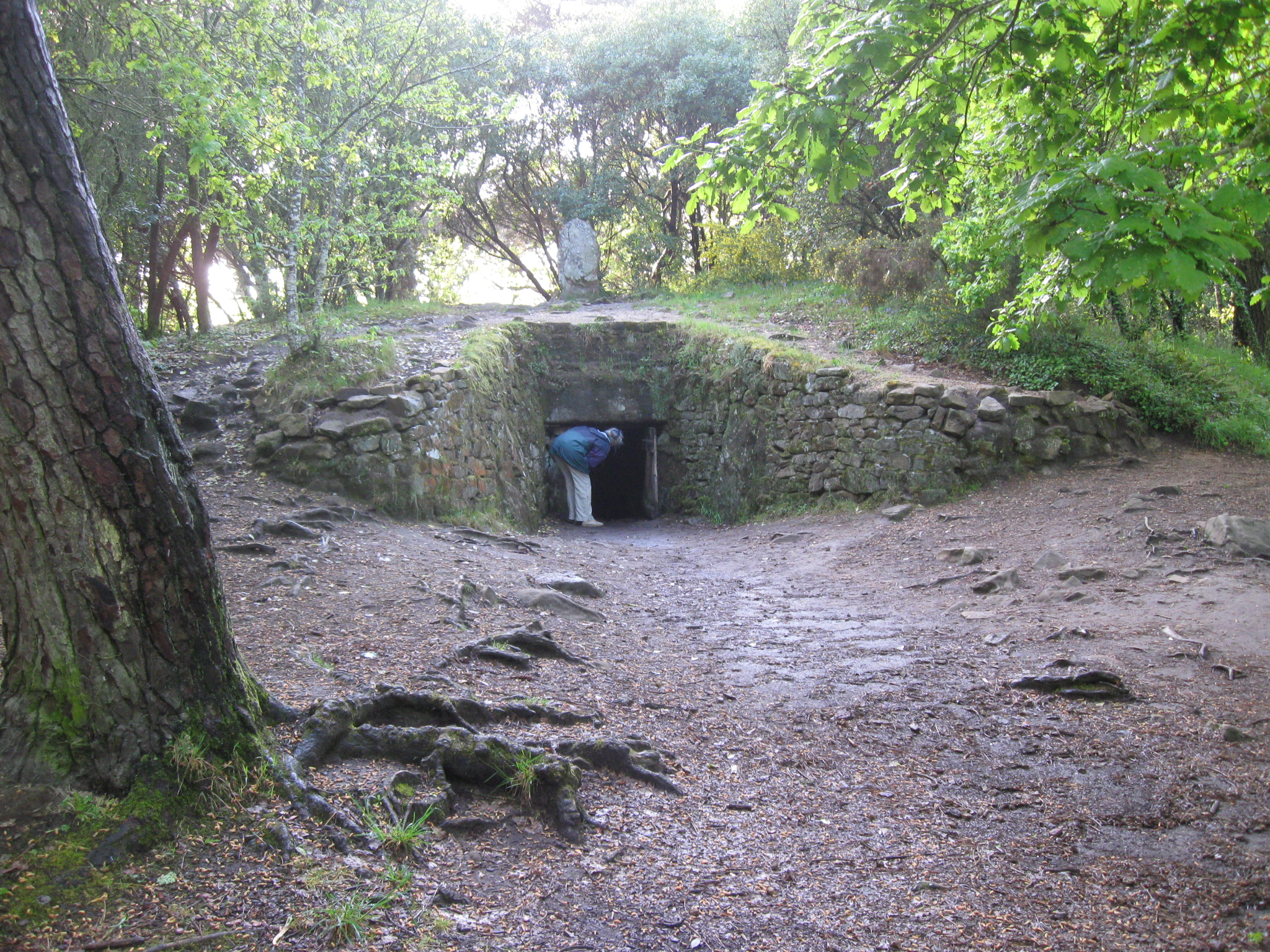 Tumulus von Kerkado, bei Carnac, Morbihan